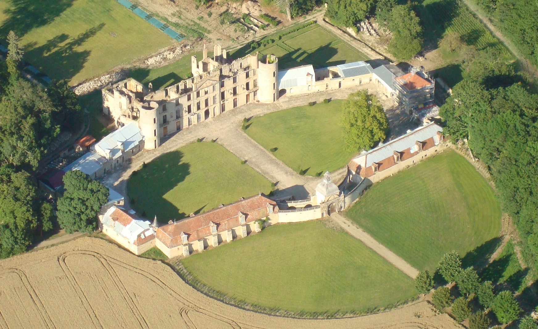 Vue aérienne 2012